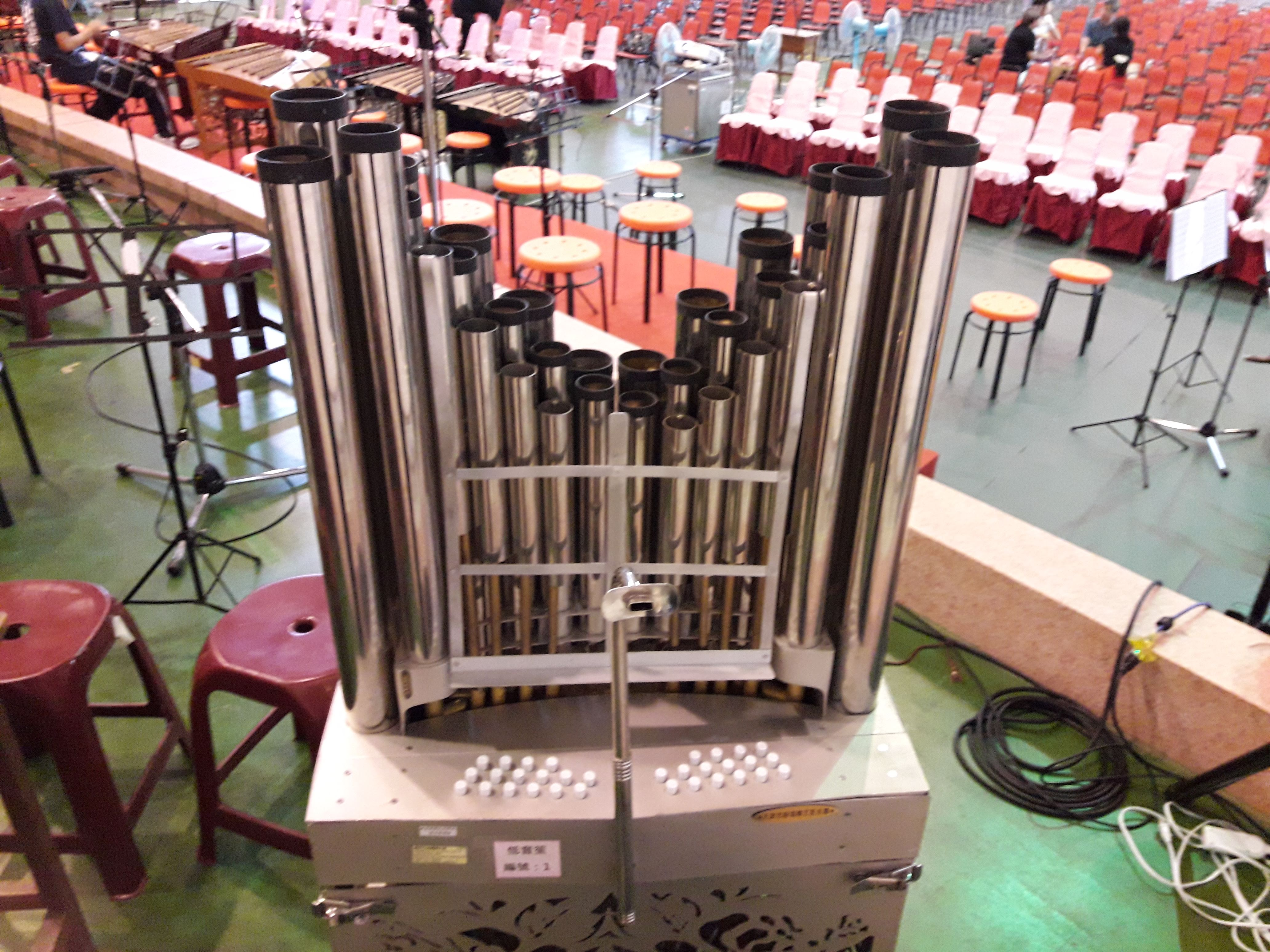 臺南市立和順國民中學國樂社的低音排笙，攝於該校風雨球場。